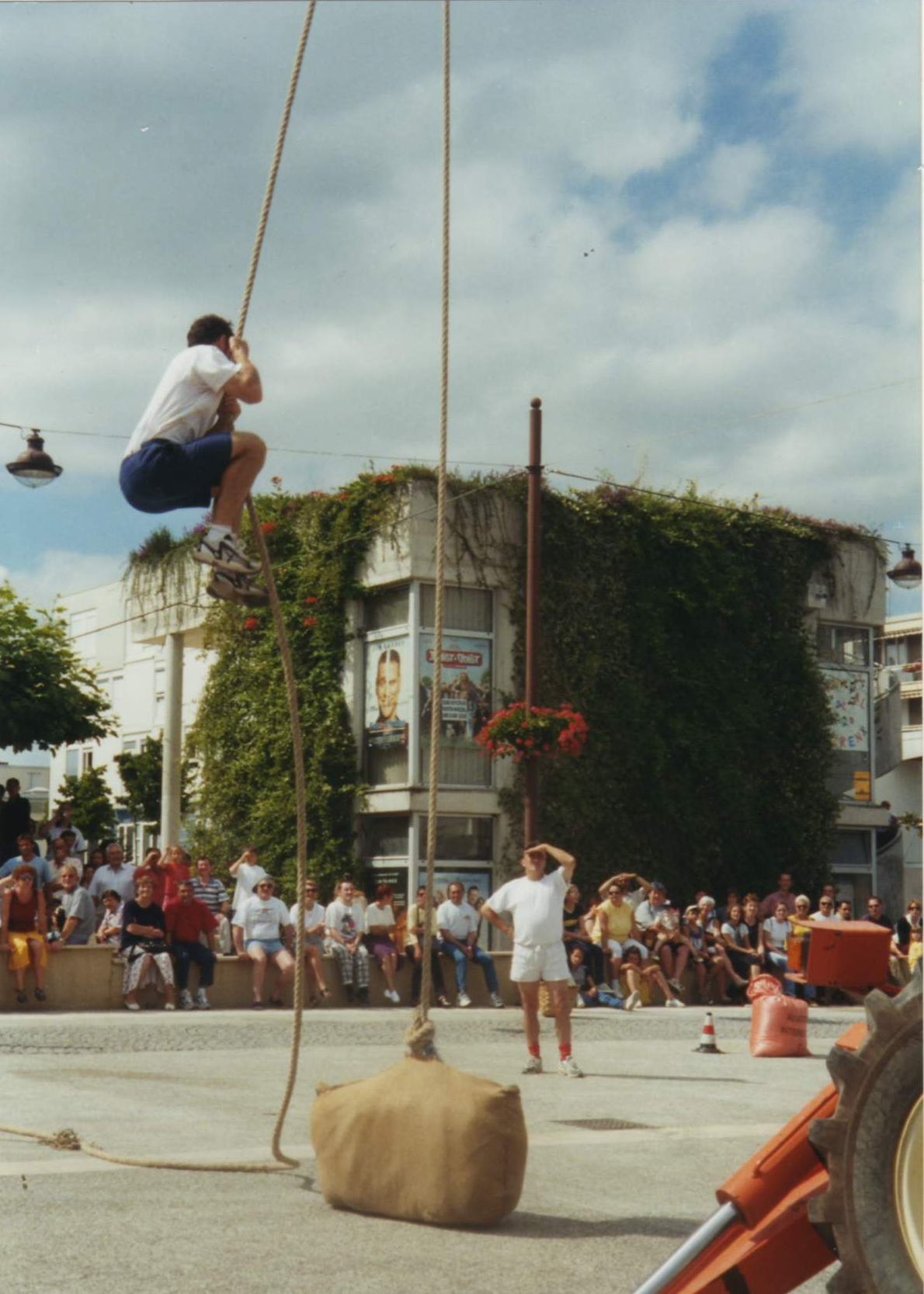 Force basque à Mourenx (Pyrénées-Atlantiques) (Pyrénées).